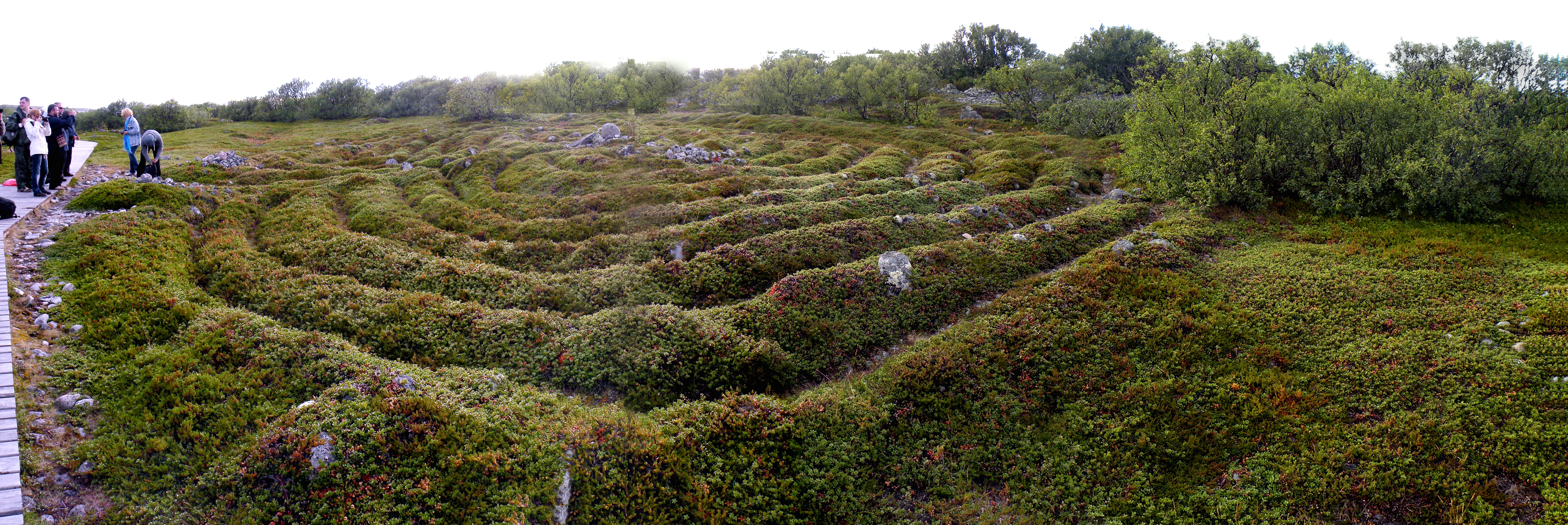 Один из 13 каменных лабиринтов Большого Заяцкого острова